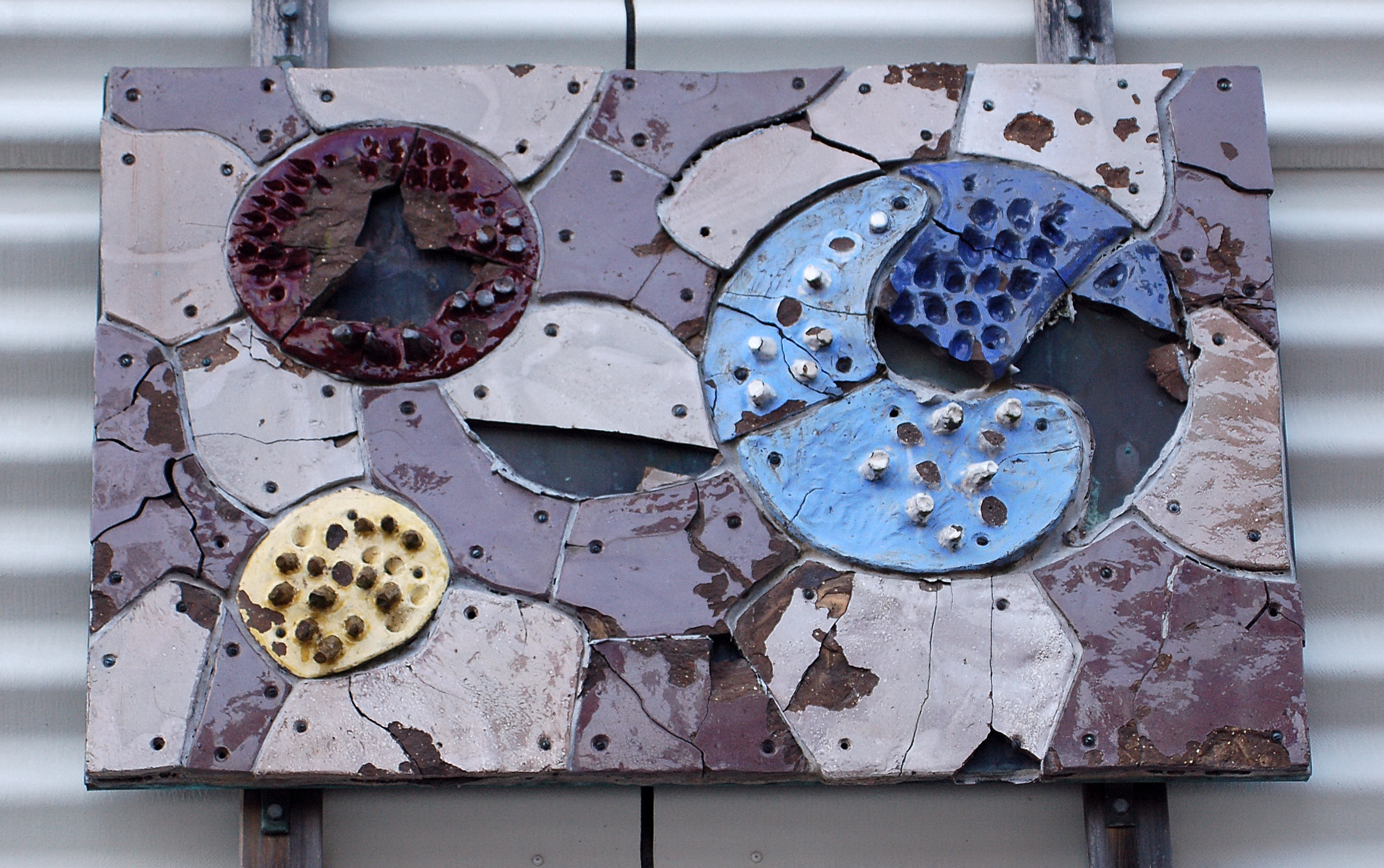 Rymdfantasi av Jan Lundgren, fasadutsmyckning på Hemvägen 7 i Våxnäs, Karlstad.